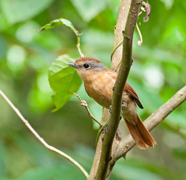 Registro-SP - Brasil